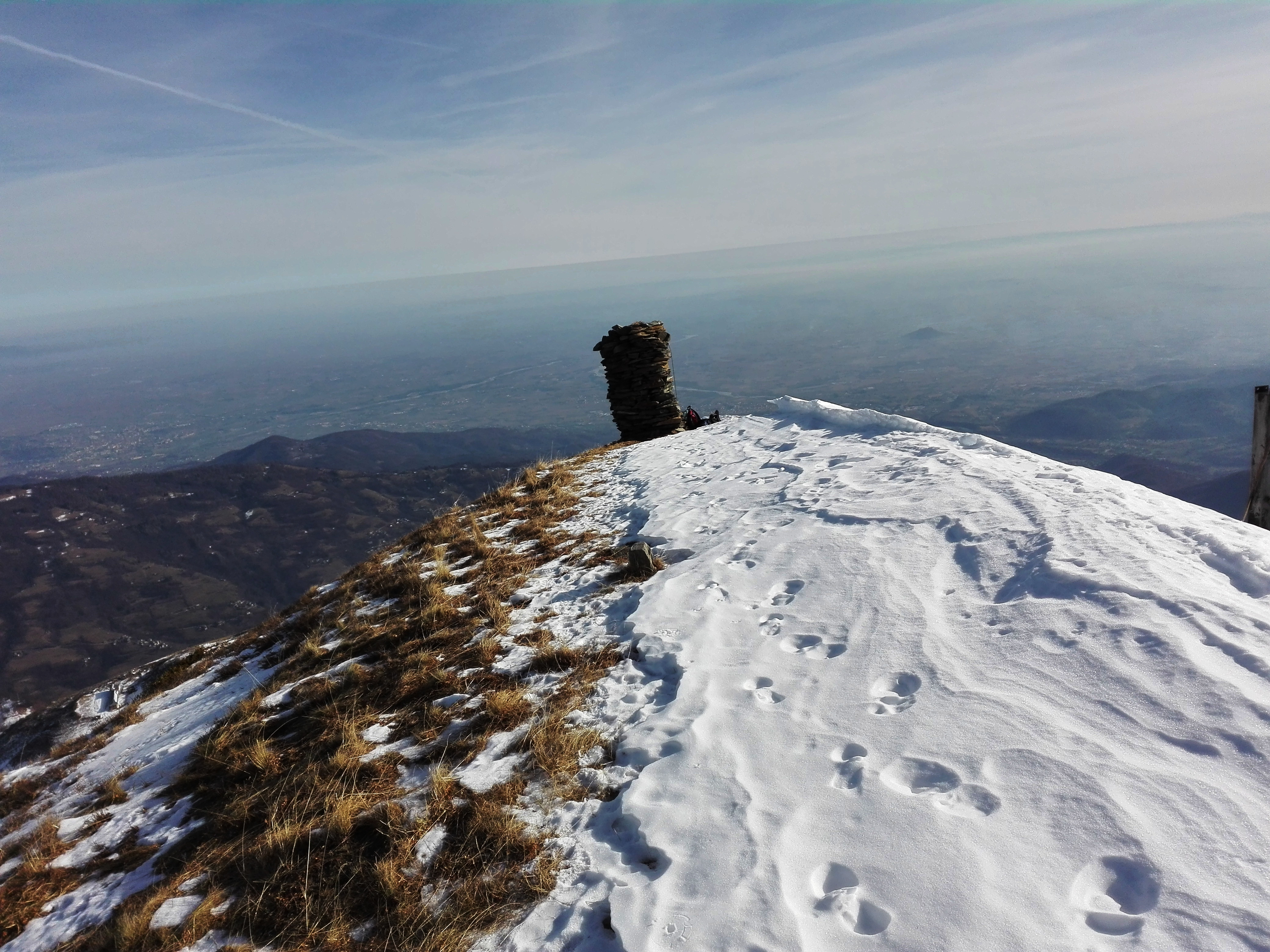 La vetta del monte Vandalino e sullo sfondo la pianura padana